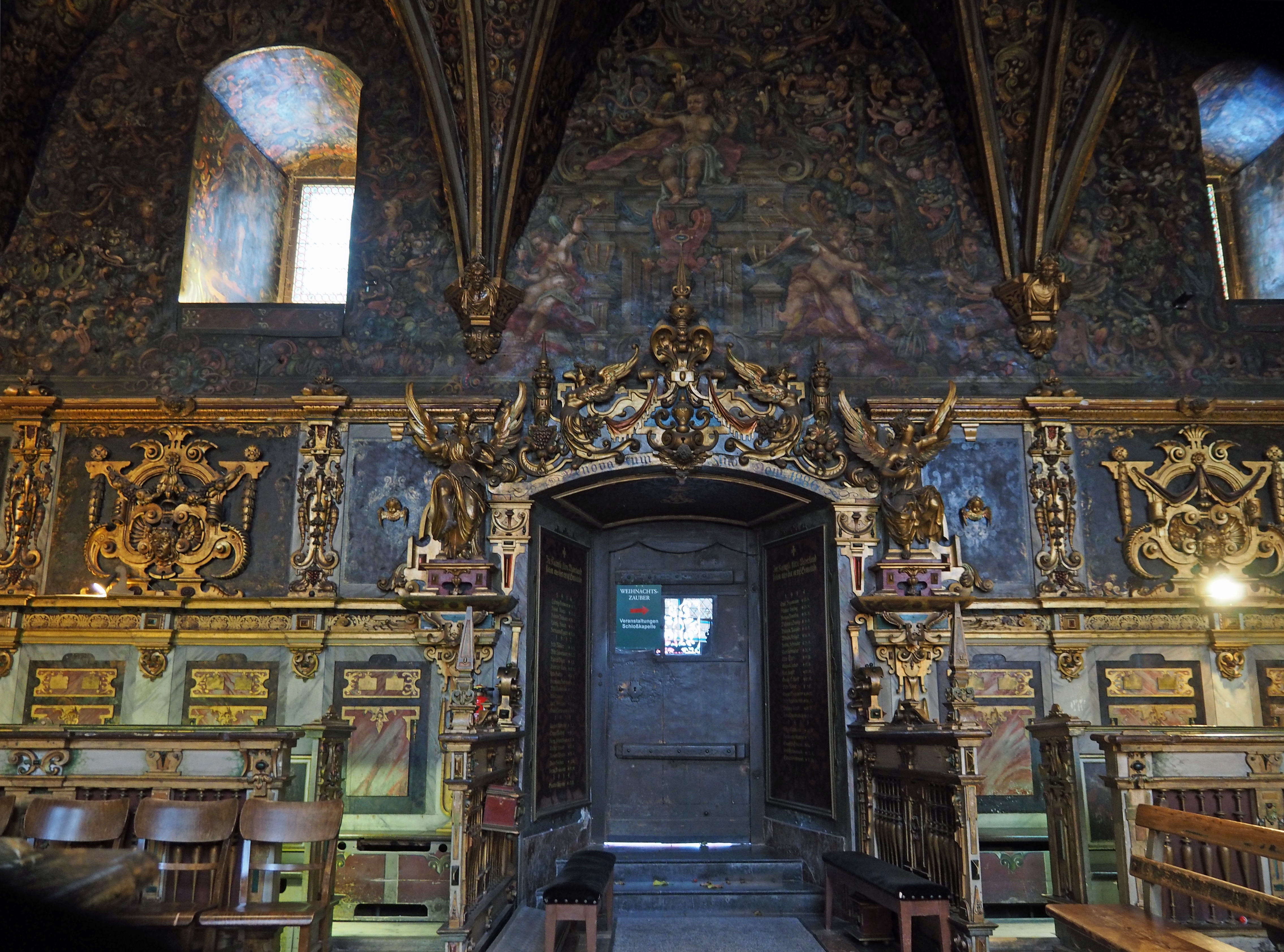 Innenraum der Schlosskapelle Bückeburg